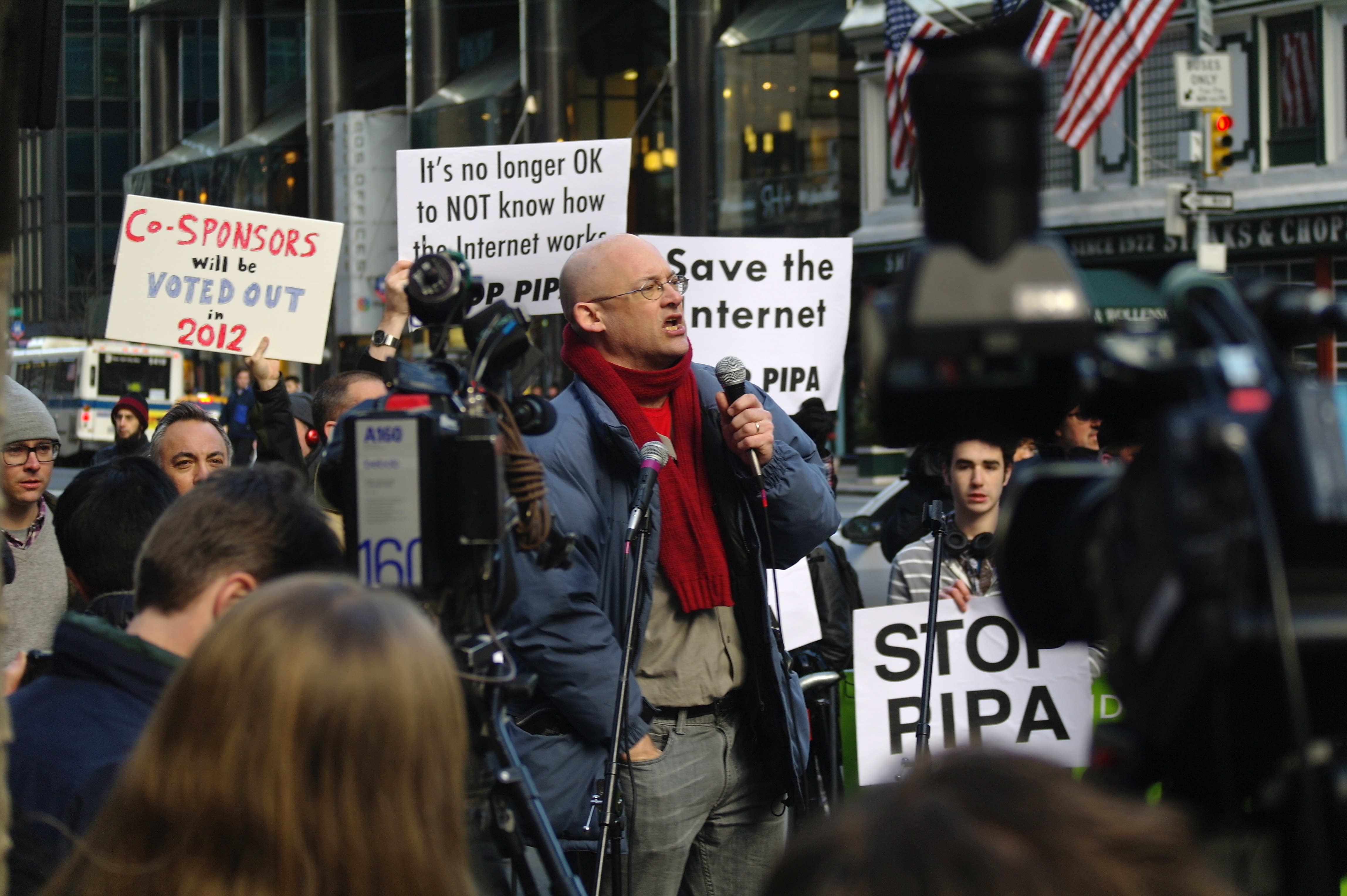 Clay Shirky